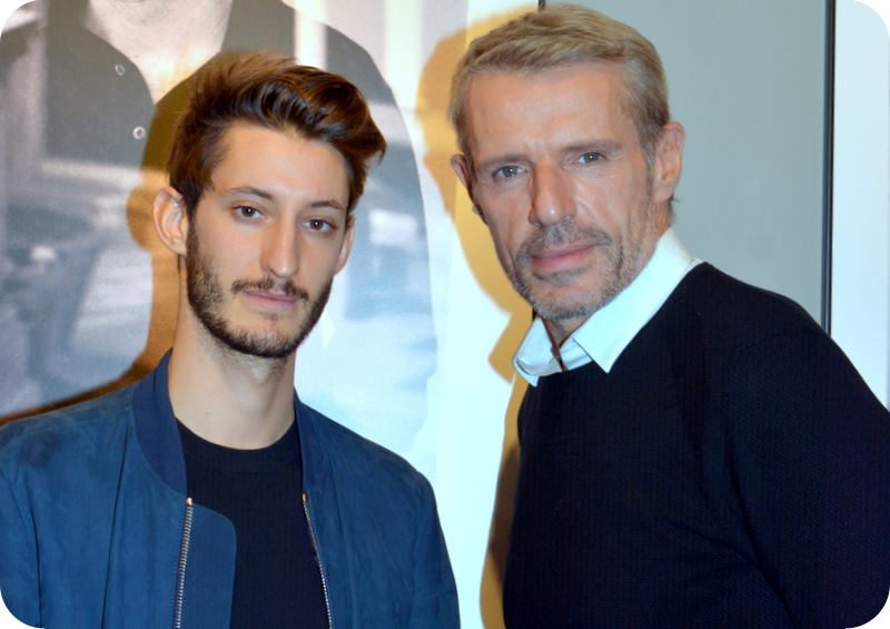 Pierre Niney et Lambert Wilson à l'avant-première de "L'Odyssée" à l'UGC Parinor (Aulnay-sous-Bois)